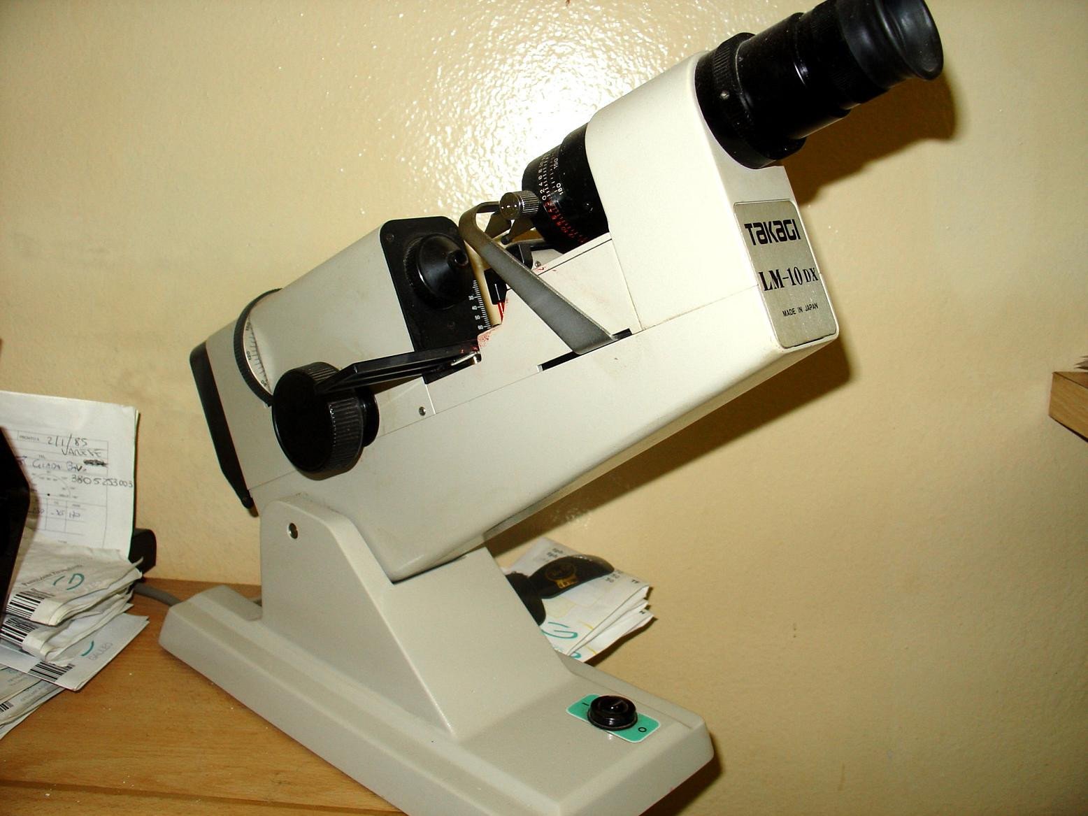 Lens Meter direct vision